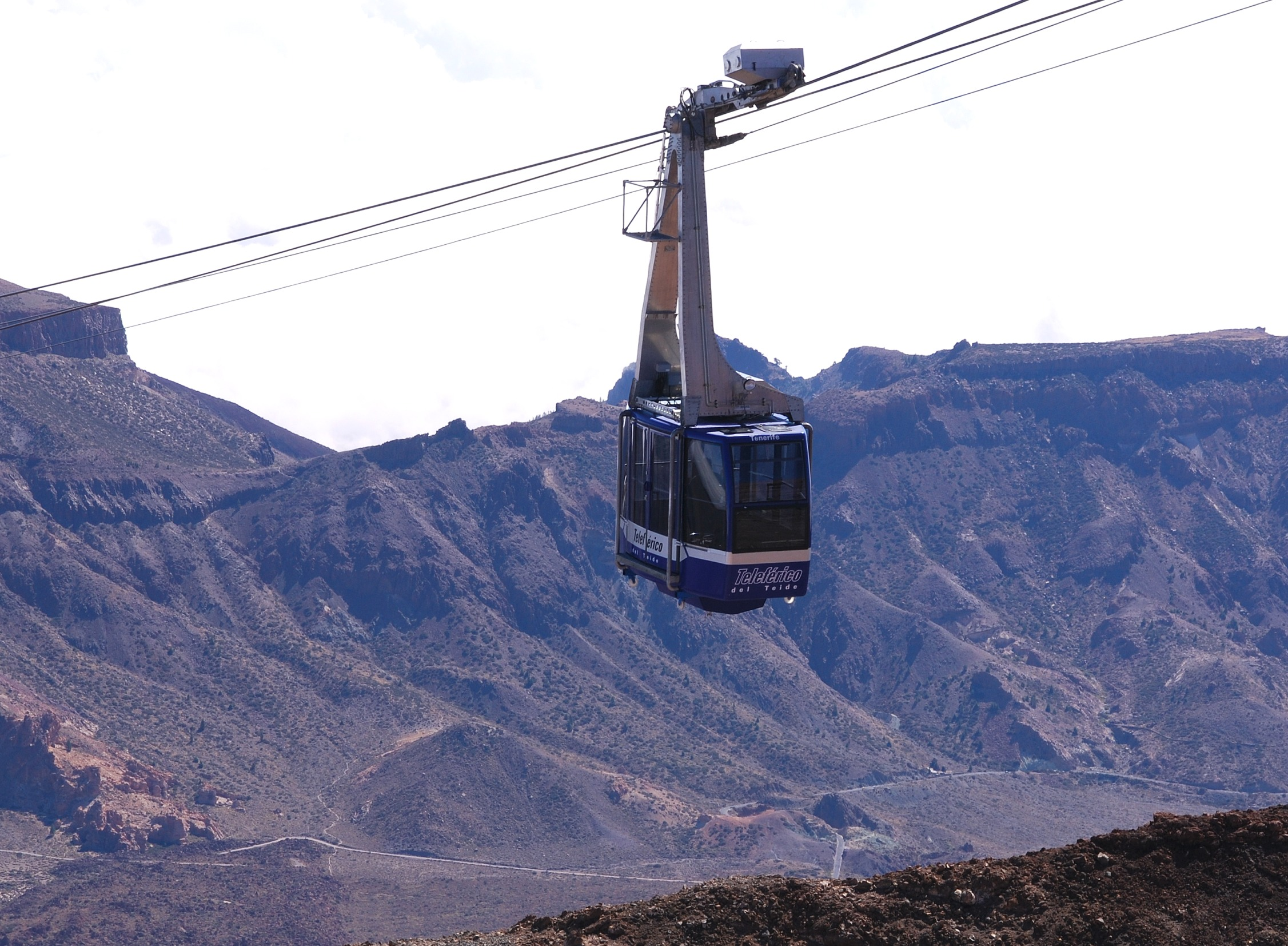 Teide-Seilbahn von der Bergstation aus gesehen